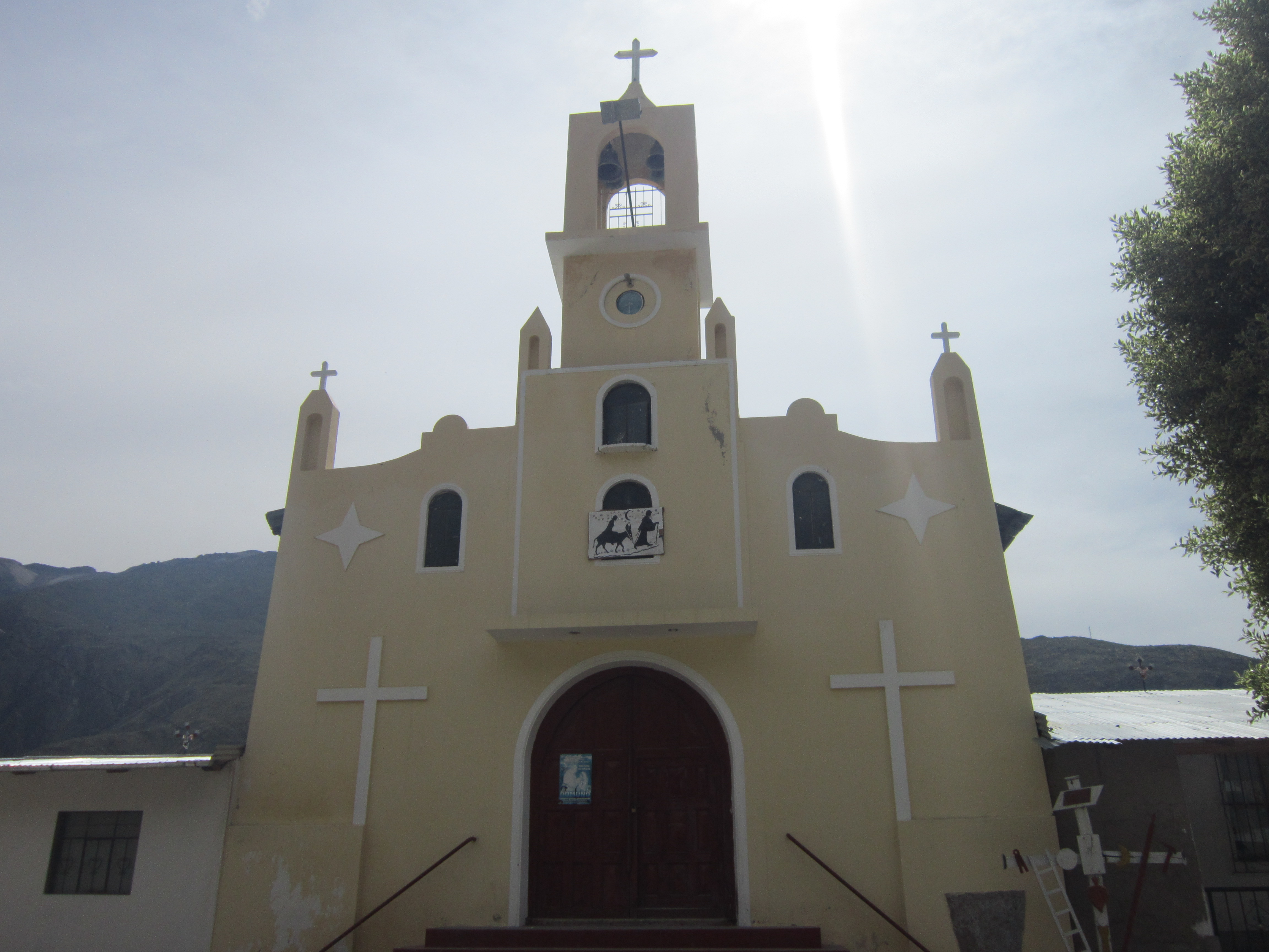 iglesia de marcabamba